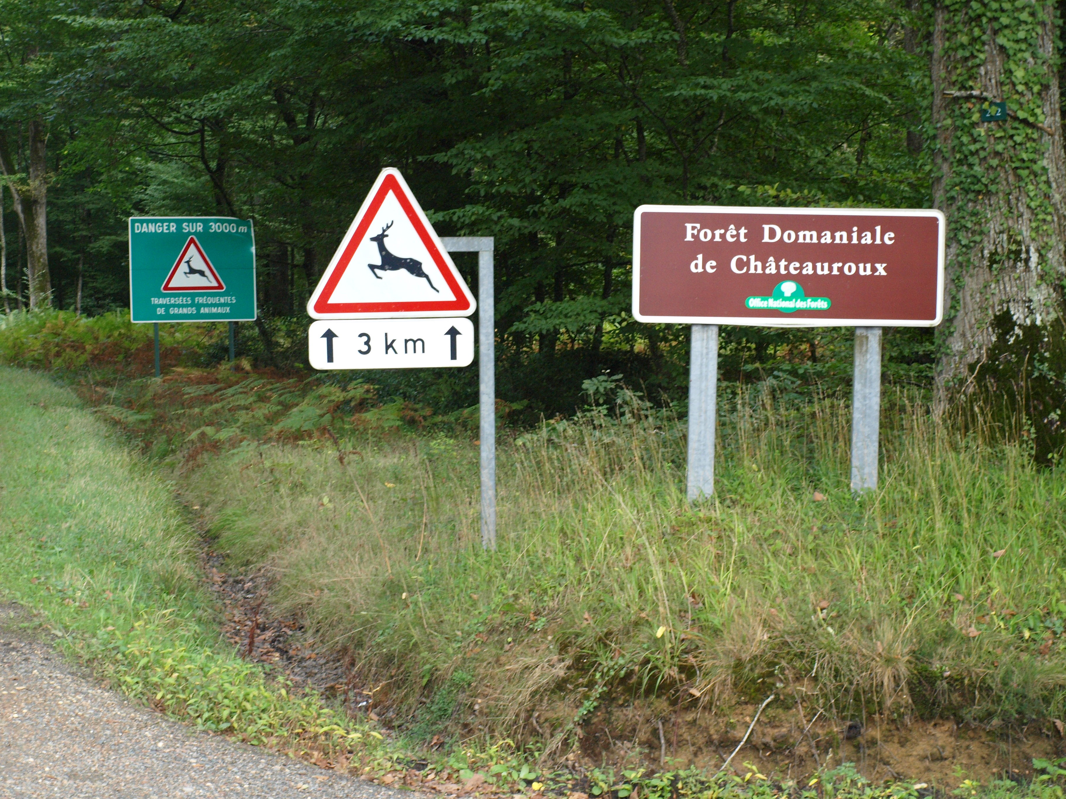 Le Poinçonnet (Indre, France) ; la chaussée de César, début de la forêt domaniale de Châteauroux, aux limites du ban d'Arthon (La Verrerie)